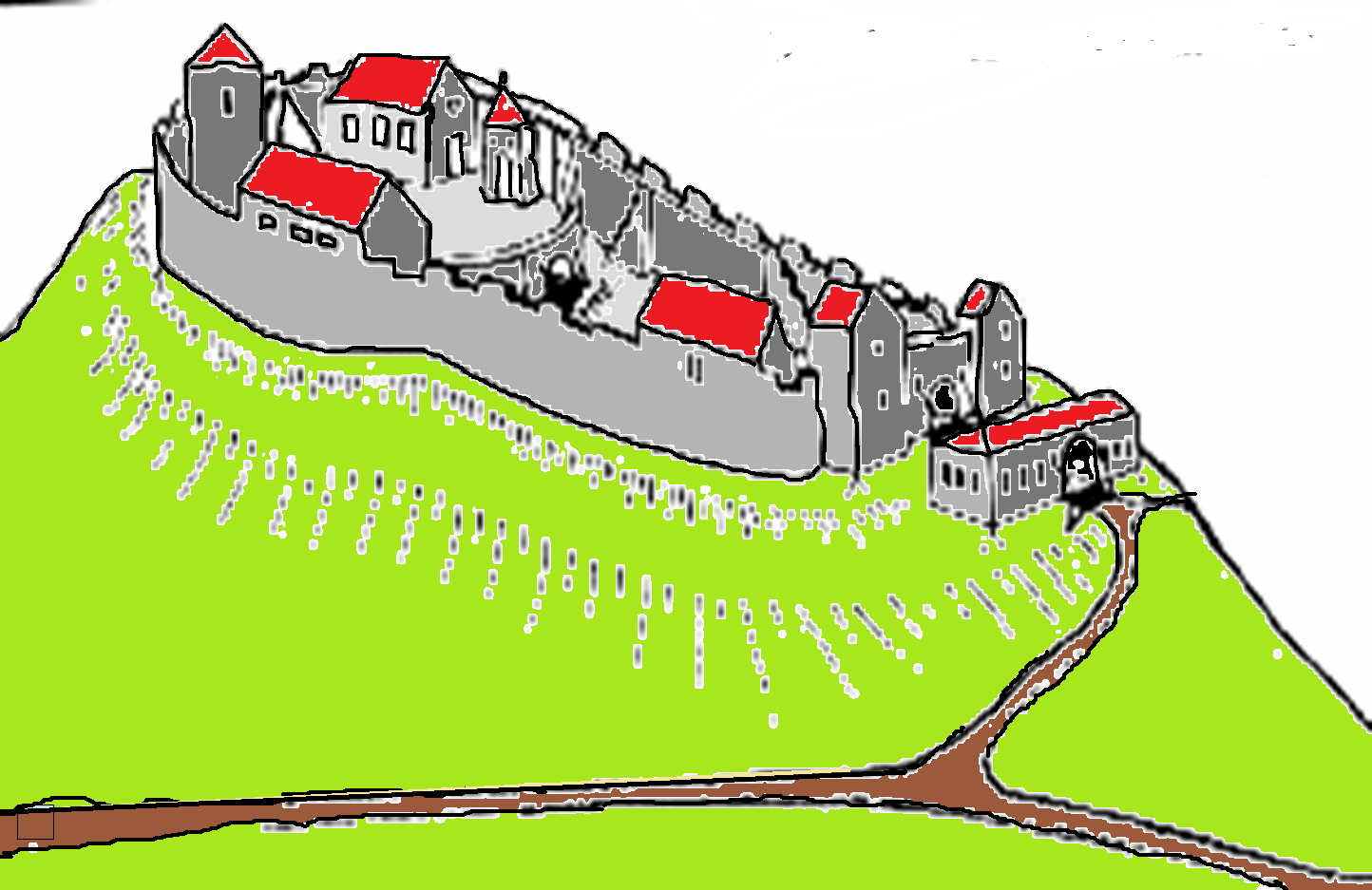 Zeichnung der Burg Reineberg